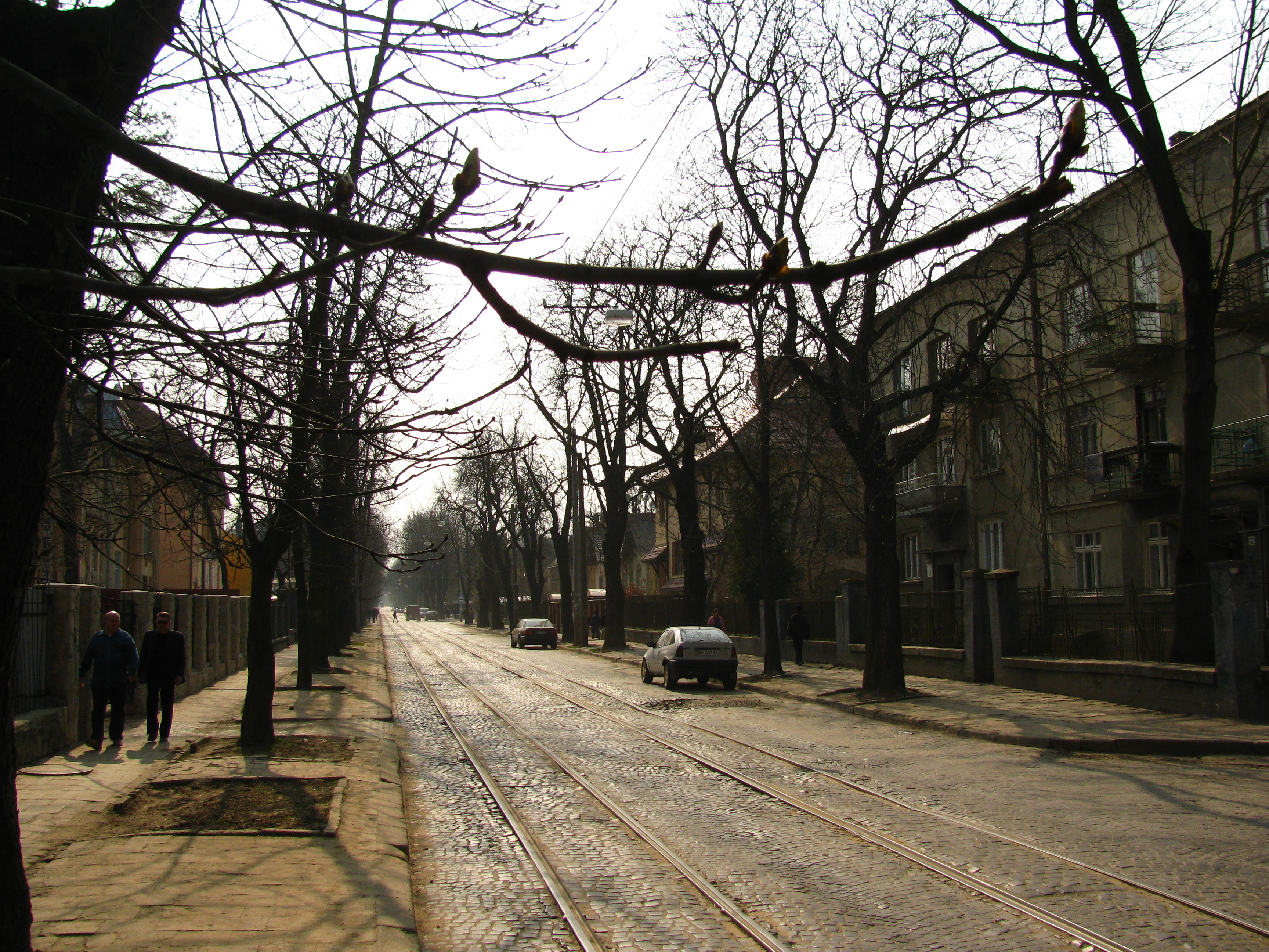 На Байках 3.jpg: Львів. вулиця Коновальця